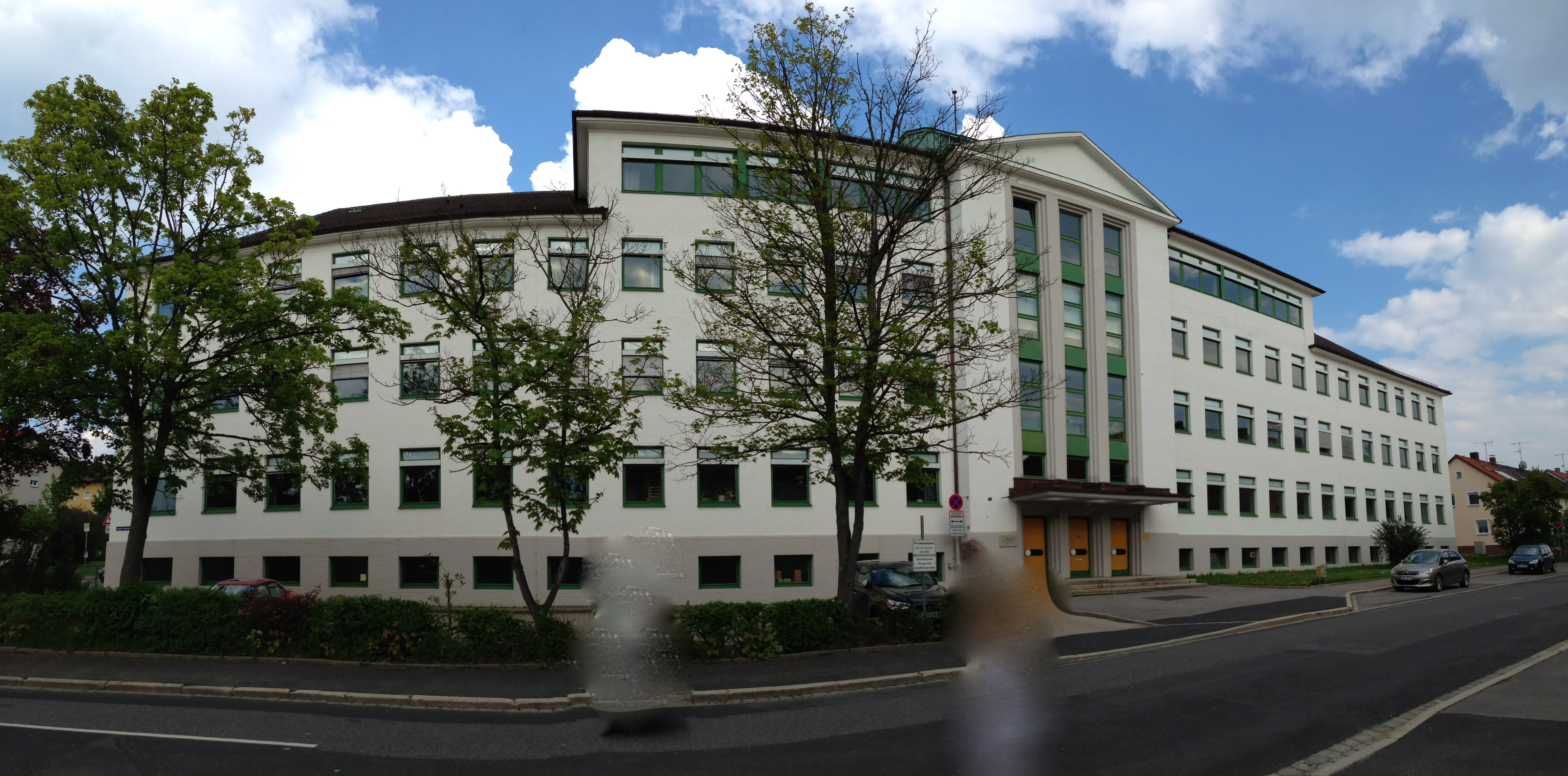 Der Altbau des Gregor-Mendel-Gymnasiums von der Moritzstraße aus gesehen.